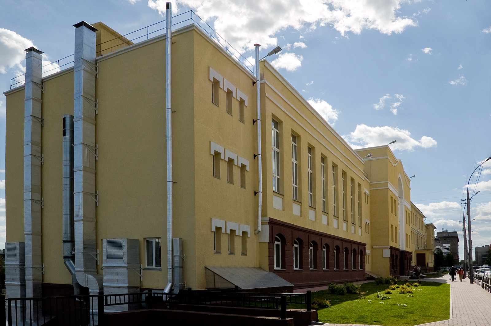 Фотография пристройки школы №12